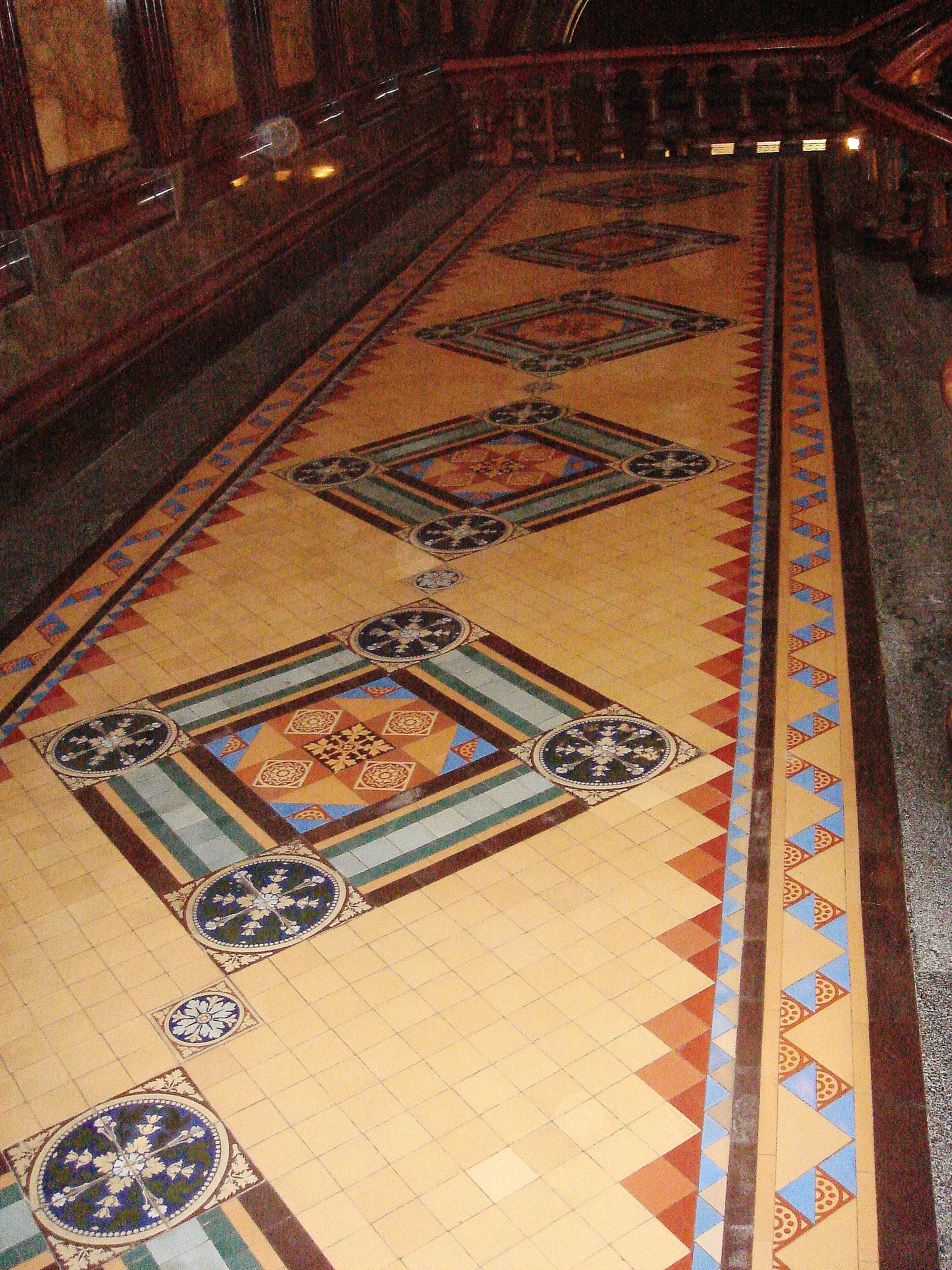 Iowa State Capitol, floor tile detail